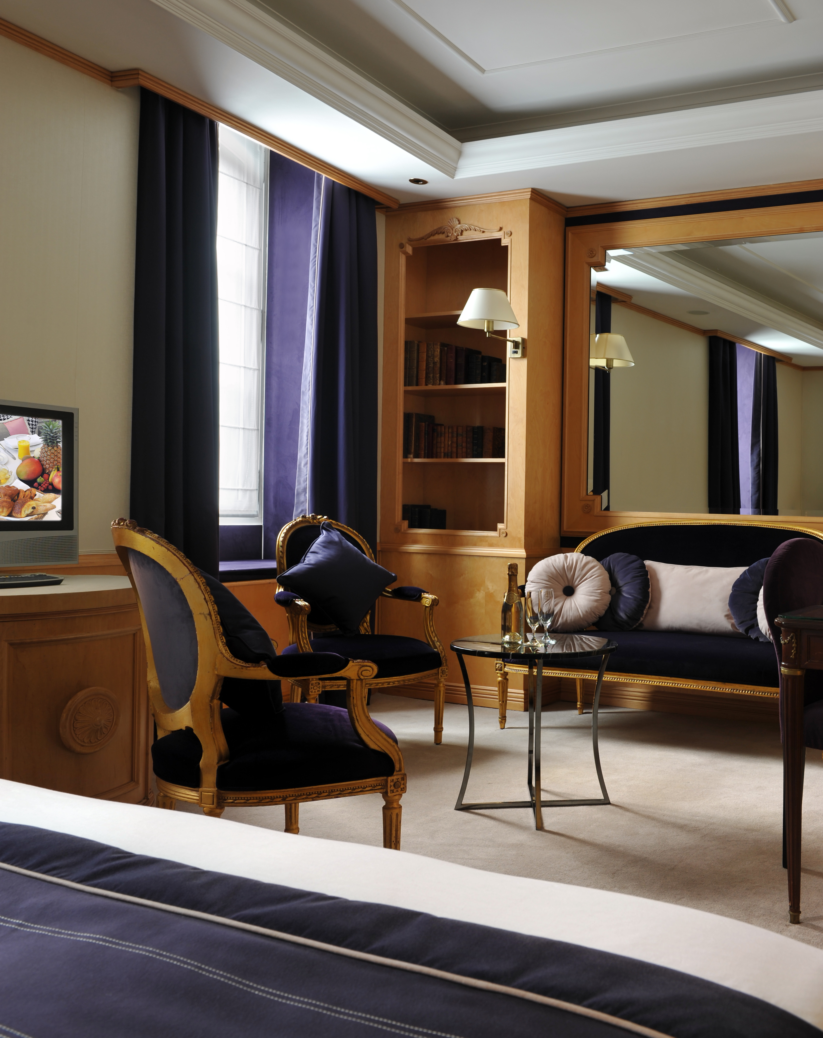 L'hôtel de Vendôme est un hôtel qui allie luxe et confort à Paris.